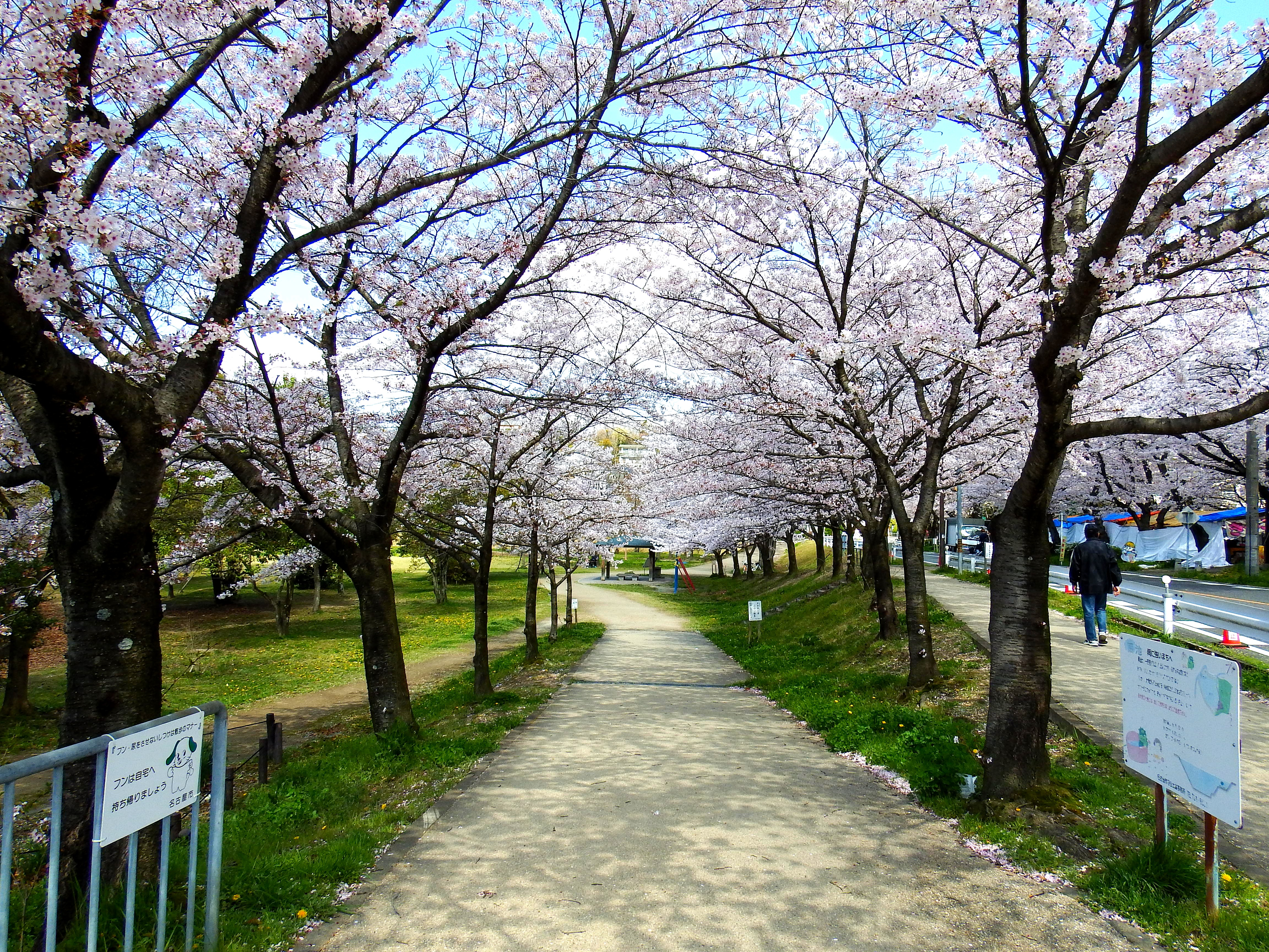 雨池公園の桜